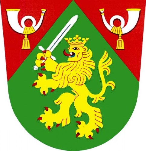 znak, Vratěnín, okres Znojmo